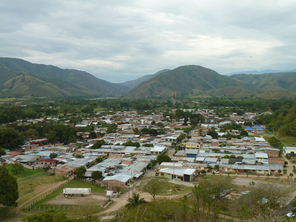 Panorámica de Guadalupe Huila